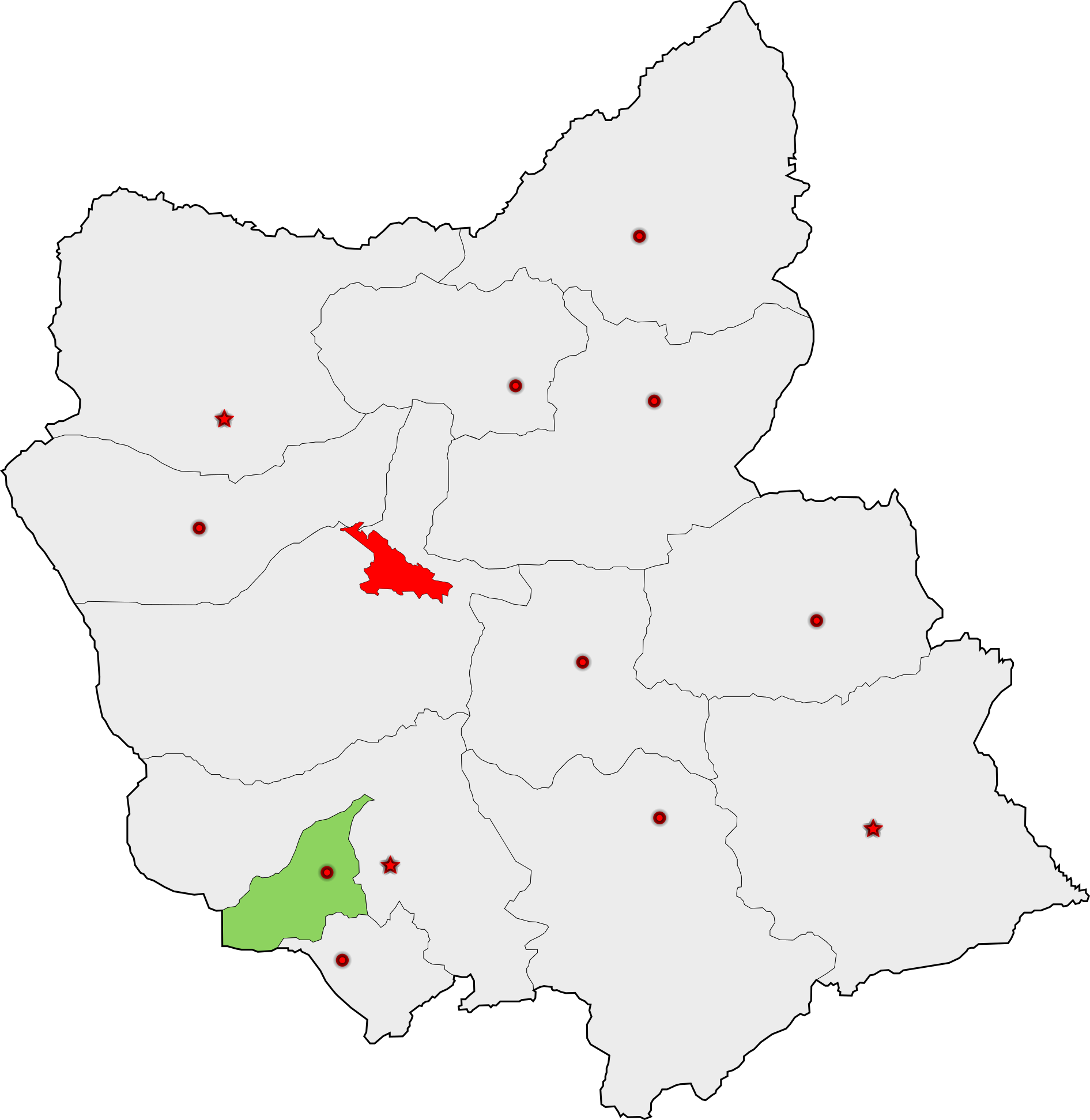 حوزهٔ انتخاباتی بناب برای انتخابات مجلس شورای اسلامی